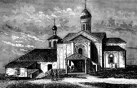 Alte Kathedrale der Enthauptung Johannes des Täufers im Iwanowski Kloster. Iwanowskij malyj Gasse, 2, Moskau: Im linken Anbau aus Stein wurde Darja Saltykowa 1779-1801 in Haft gehalten.